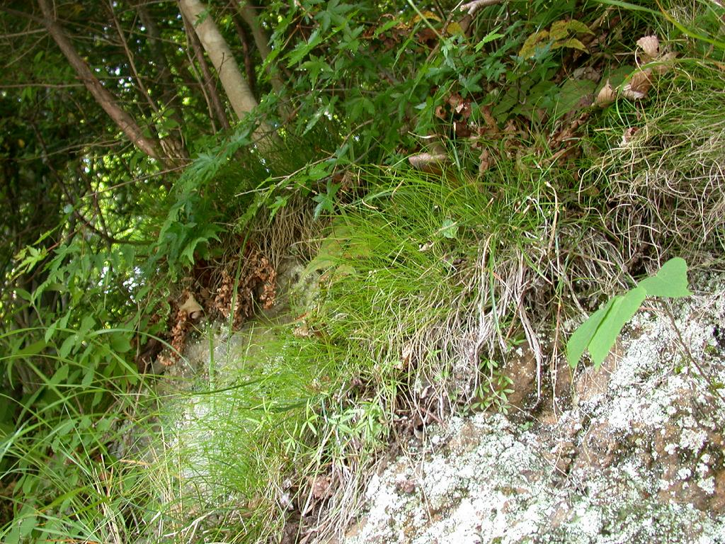 Carex fernaldiana：イトスゲ 2005/06/04 和歌山県高野山：Kouyasan:Wakayama Pref.